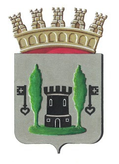 Wapenschild van Torhout.